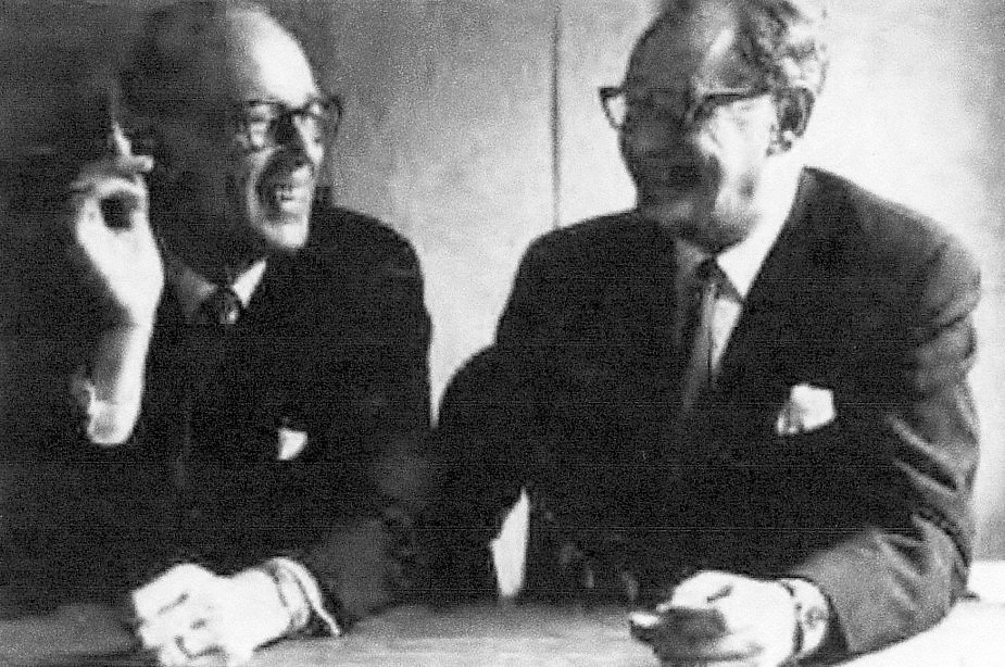 Arkitekterna Erik (t.h.) och Tore Ahlsén (t.v.)